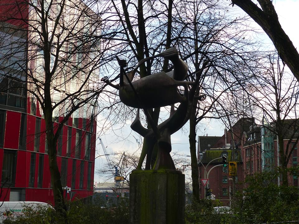 Bronzeskulptur Hexenfahrt (1973) von Gisela Engelin-Hommes in der Nähe des Hexenbergs Hamburg Altona